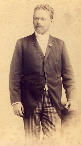 Вацлав Гавел (1861—1921)